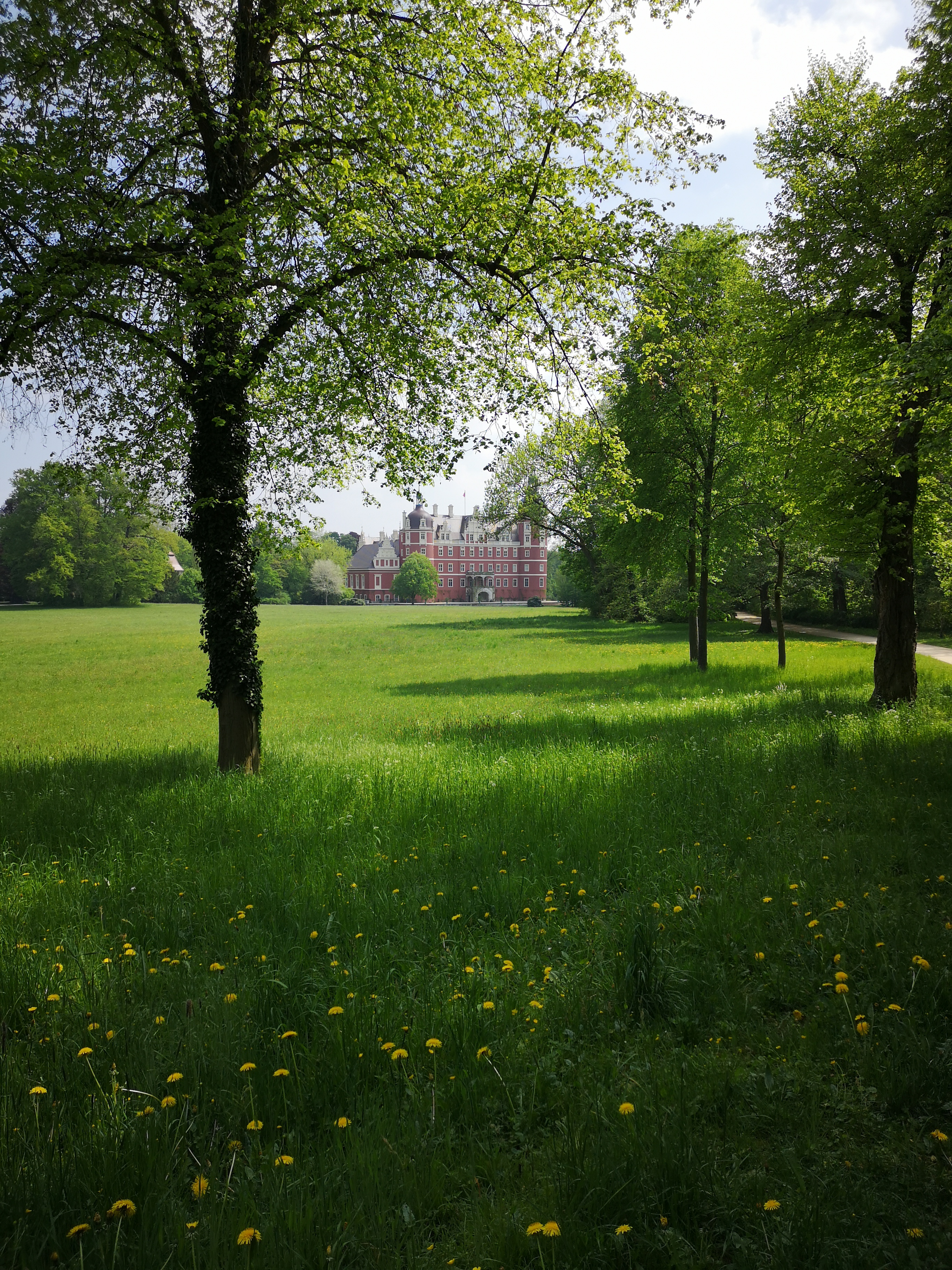 Fragment niemieckiej cześci Parku Mużakowskiego. Na dalszym planie Nowy Zamek.